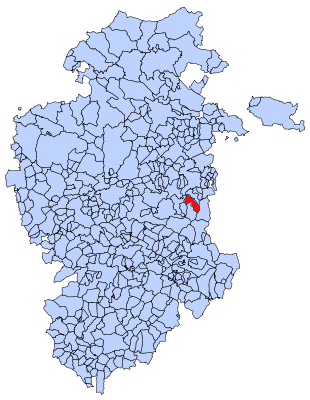 Pradoluengo en Burgos